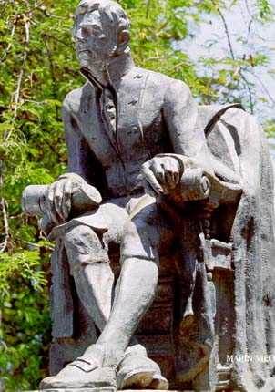 Foto del monumento de JUAN DEL CORRAL, en la plaza de Santa Fe de Antioquia, Colombia